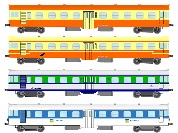 Le livree rivestite dalle ALn 668 della SNFT, poi delle FNM